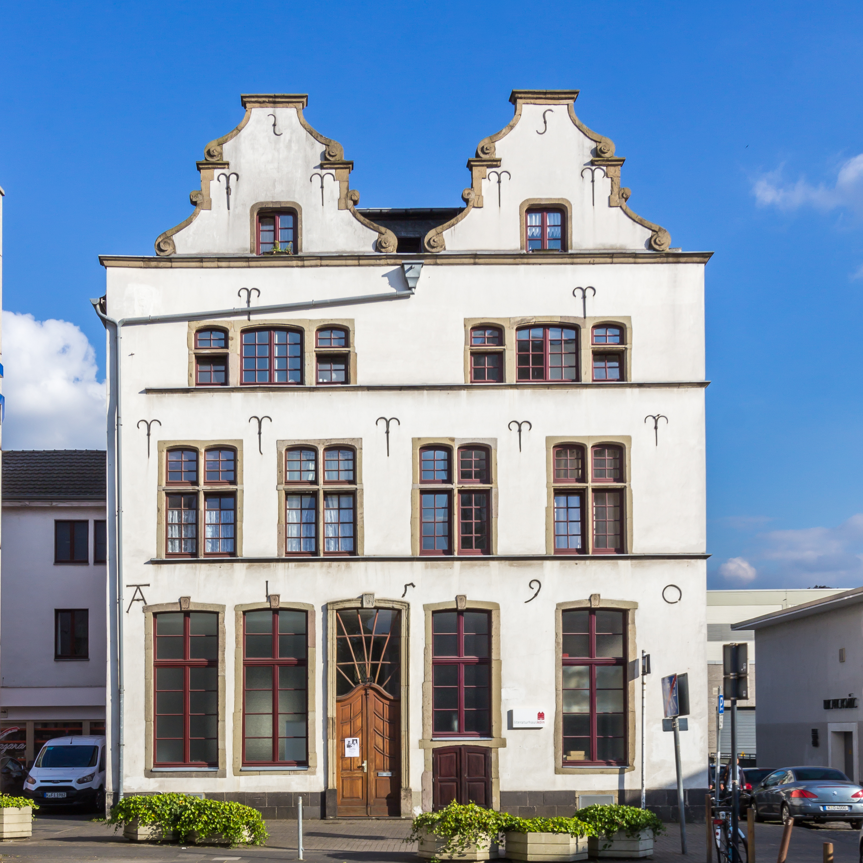 Denkmalgeschütztes Wohnhaus Großer Griechenmarkt 37-39. 1590 urschriftlich datiert. Das Literaturhaus Köln e.V. hat dort seinen Sitz.